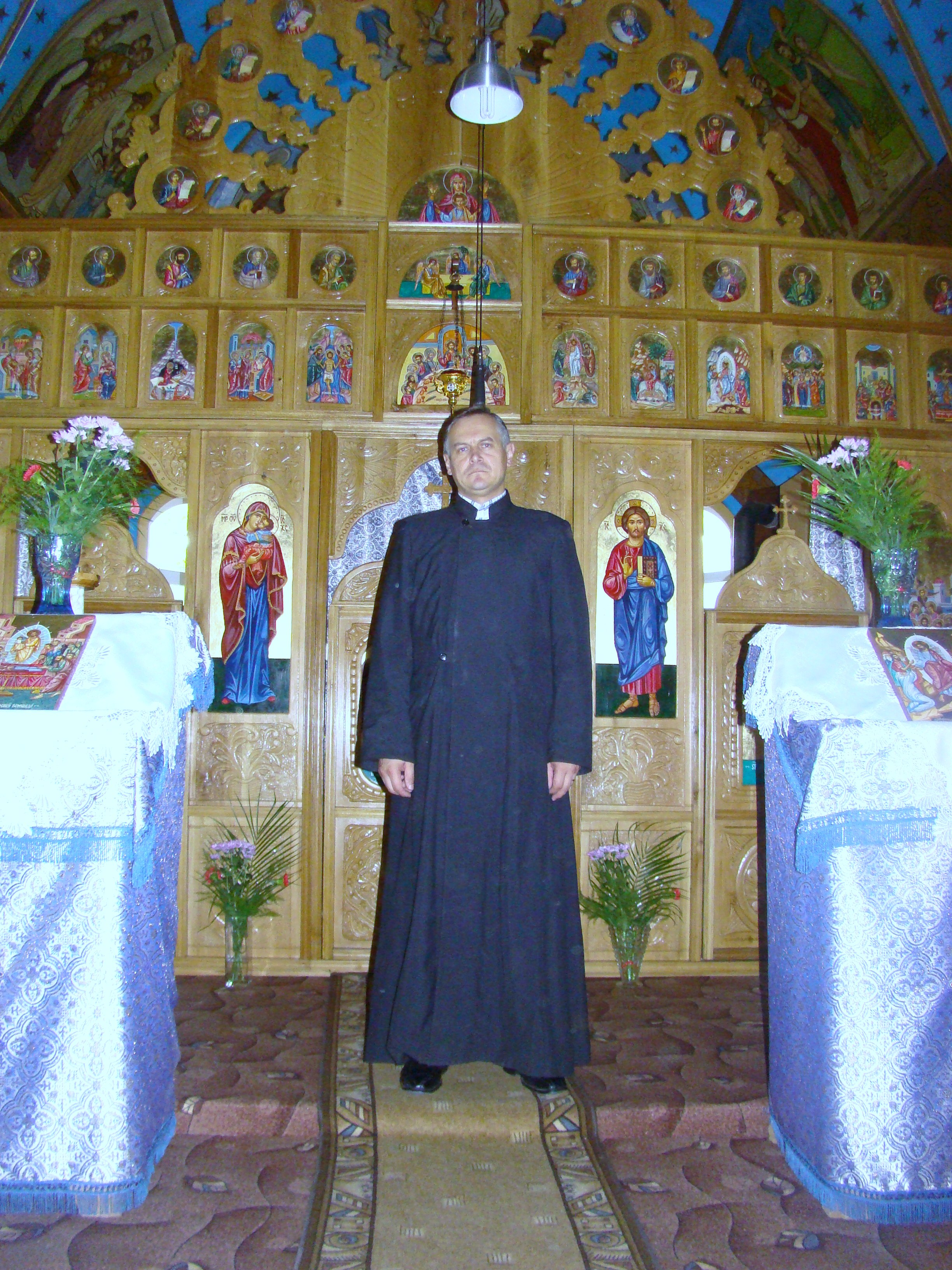 Biserica de lemn din Măguri-Răcătău (filia Teleni), județul Cluj